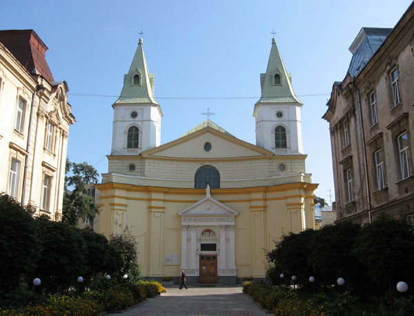 Бывший костел св. Урсулы во Львове на ул. Зеленой